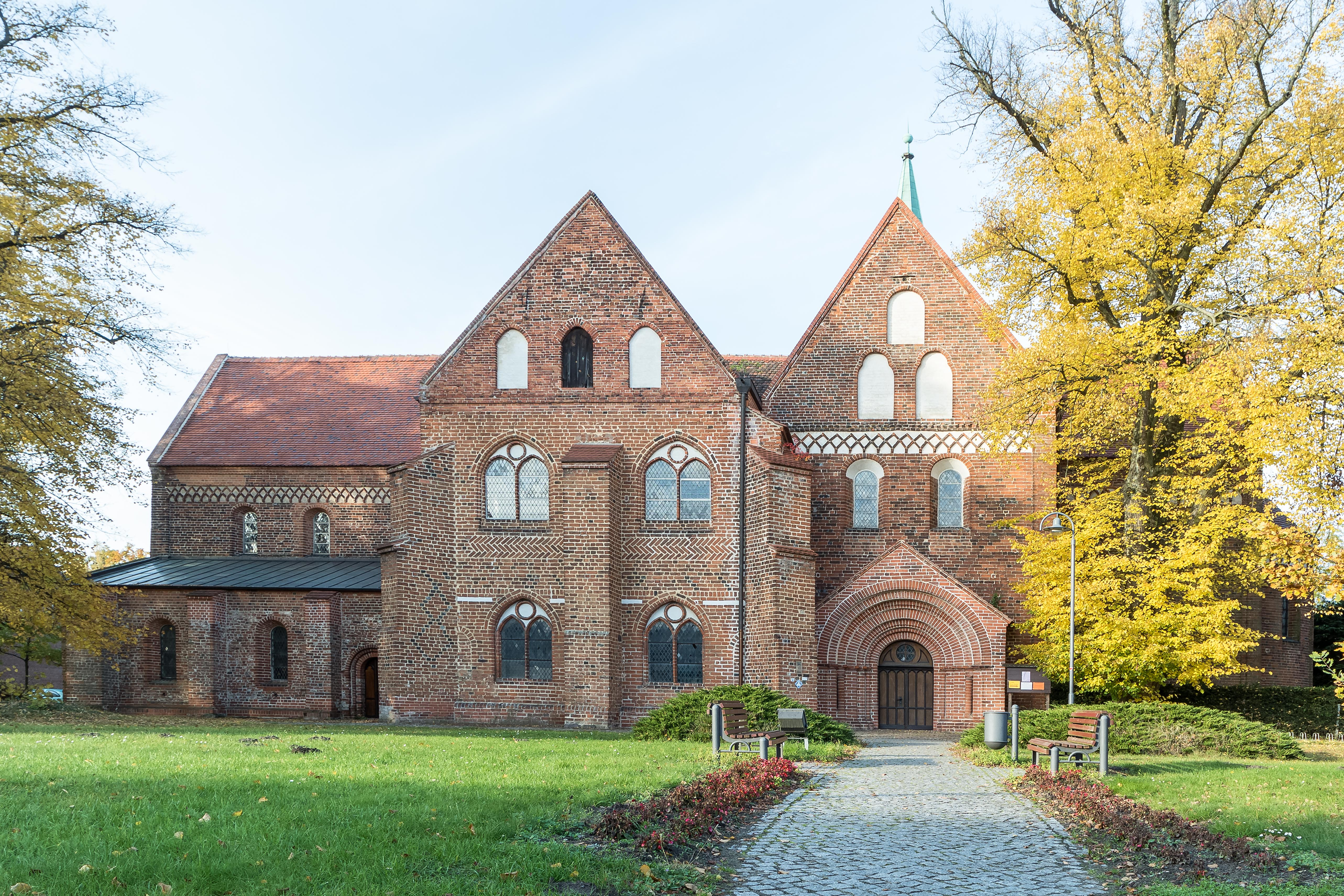 Klosterkirche St. Maria, Johannes Evangelista und Nikolaus, Amtsfreiheit 16 in Arendsee (Altmark)